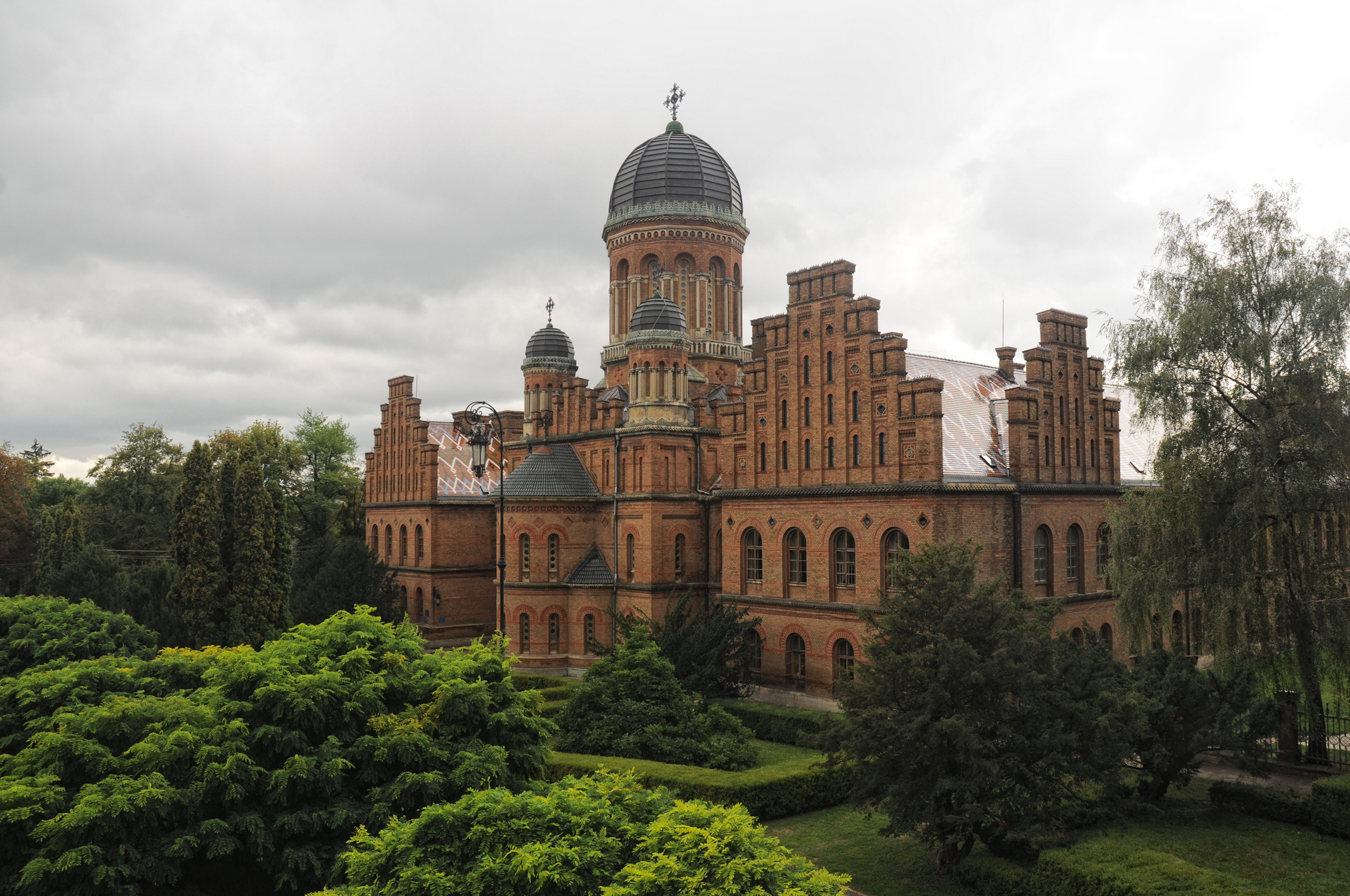 Резиденція буковинських митрополитів, Семiнарський корпус